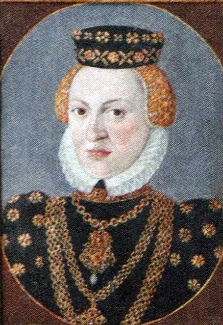 Bildnis von Katharina von Braunschweig-Wolfenbüttel aus einem Kabinettschrank mit 14 fürstlichen Portraits.